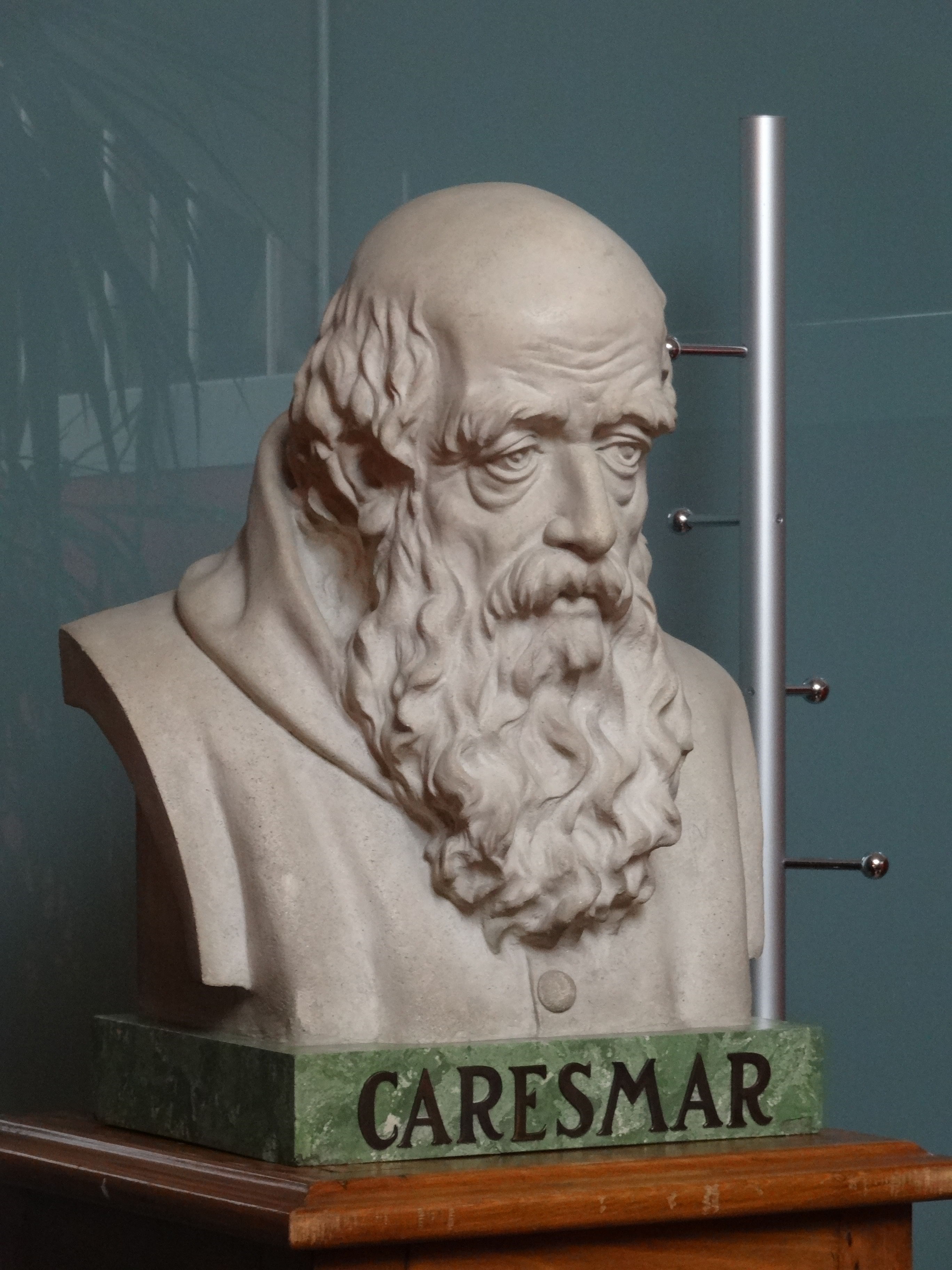 Bust de Caresmar a la biblioteca de cal font d'Igualada